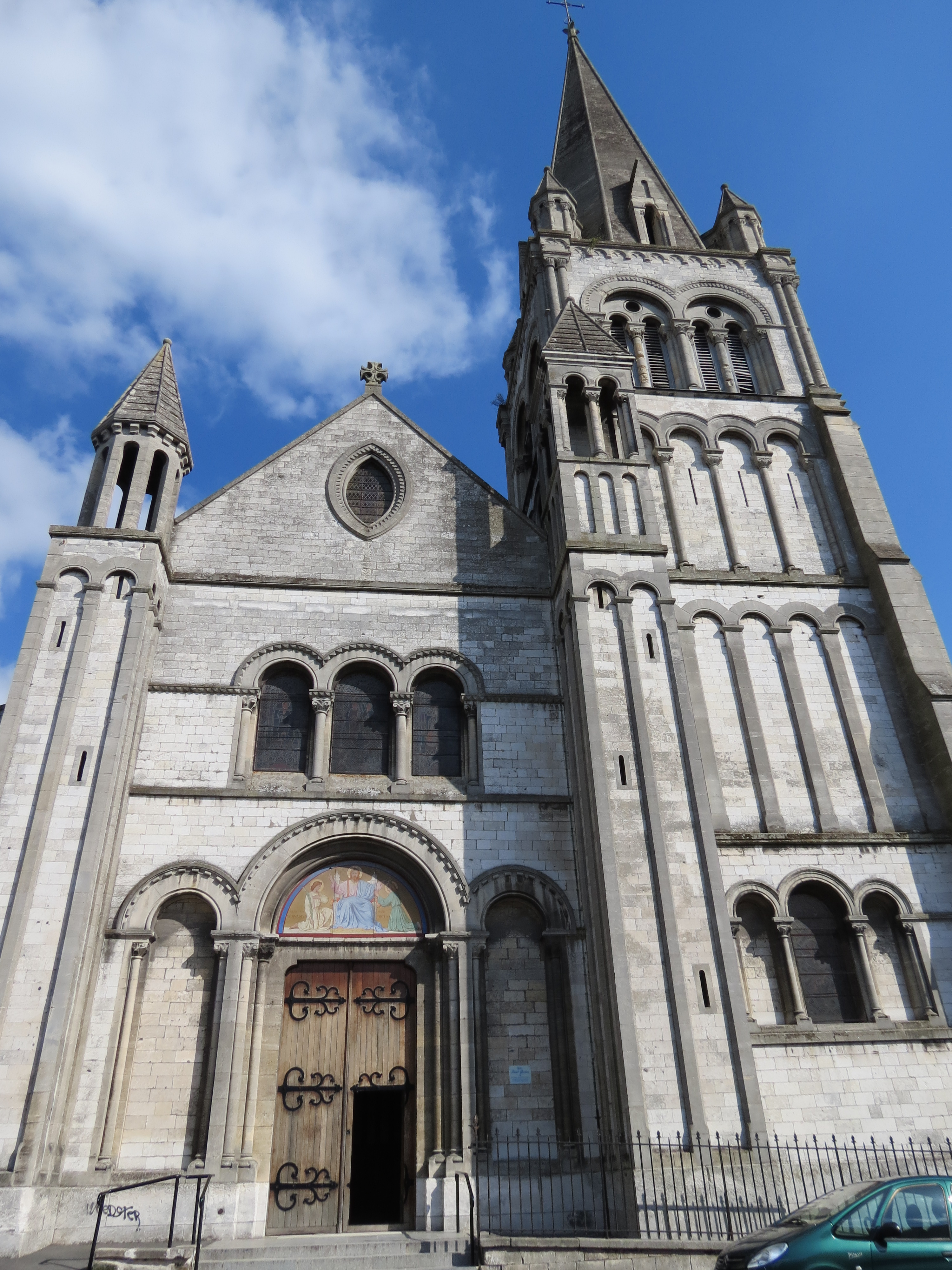 Église néo-romane Saint-Gervais de Rouen construite entre 1868 et 1874. Façade principale flanquée de deux tours surmontées par une lanterne et d'une grosse tour quadrangulaire. La façade est animée , au second niveau, par un triplet de baies en plein-cintre.